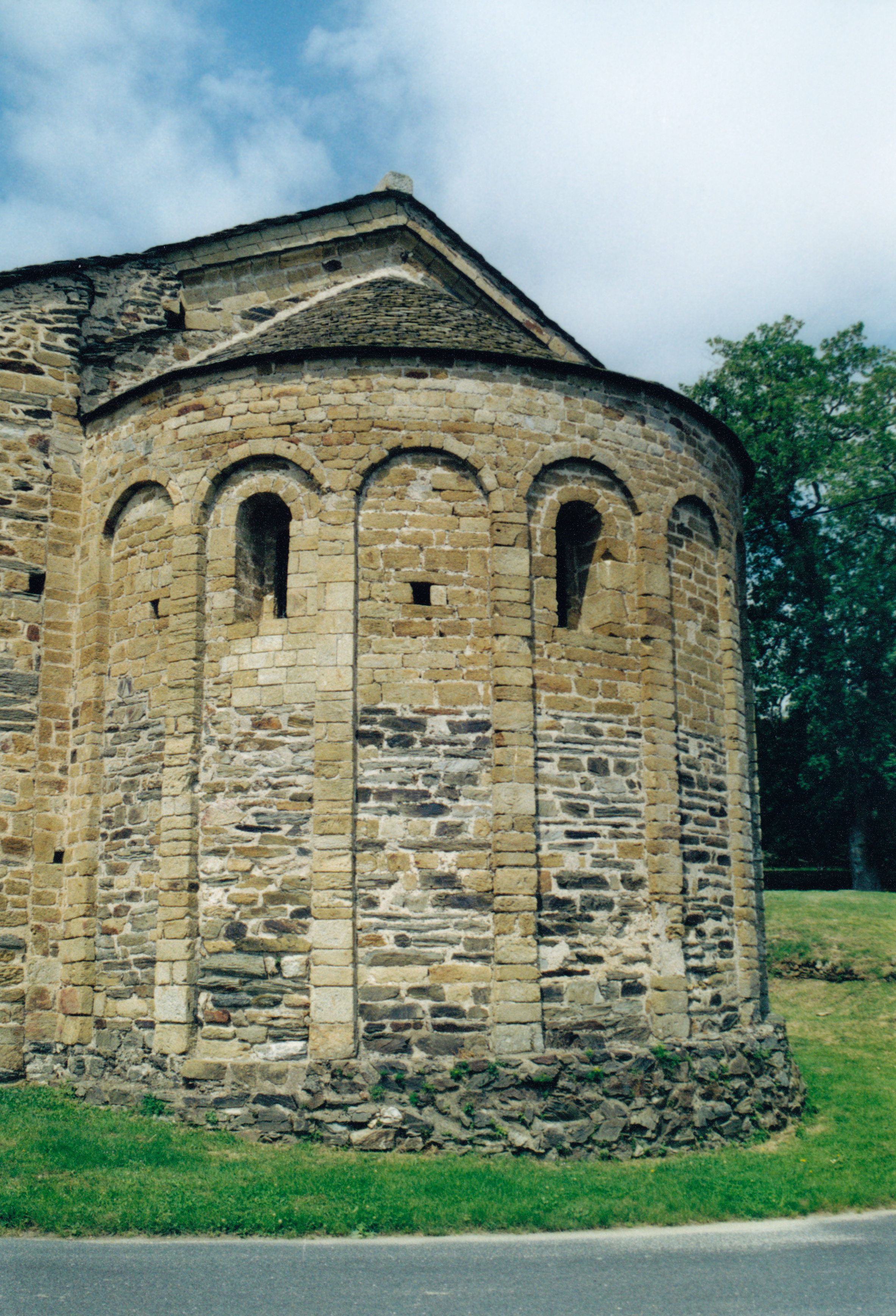 France - Pyrénées-Orientales - Aspres - Chapelle de la Trinité de Prunet-et-Belpuig